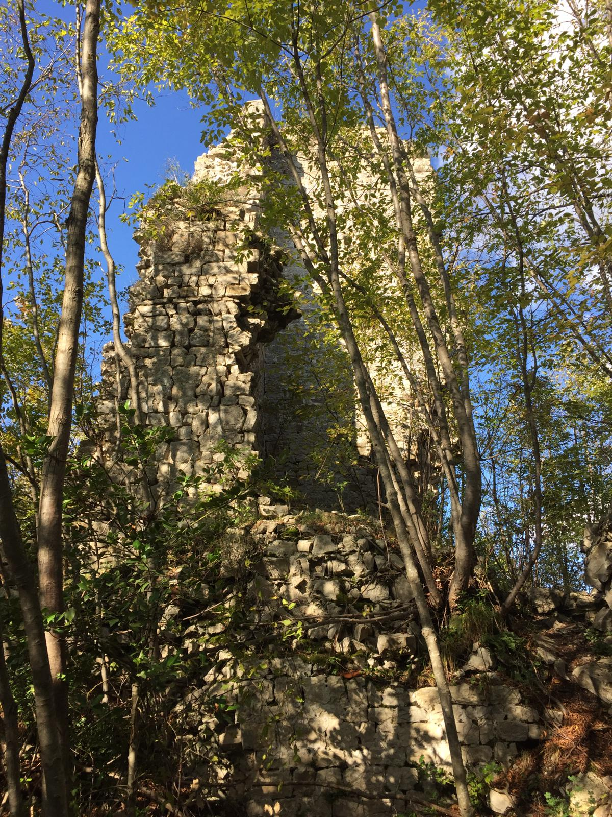 Castello Inferiore di Attimis - Torre